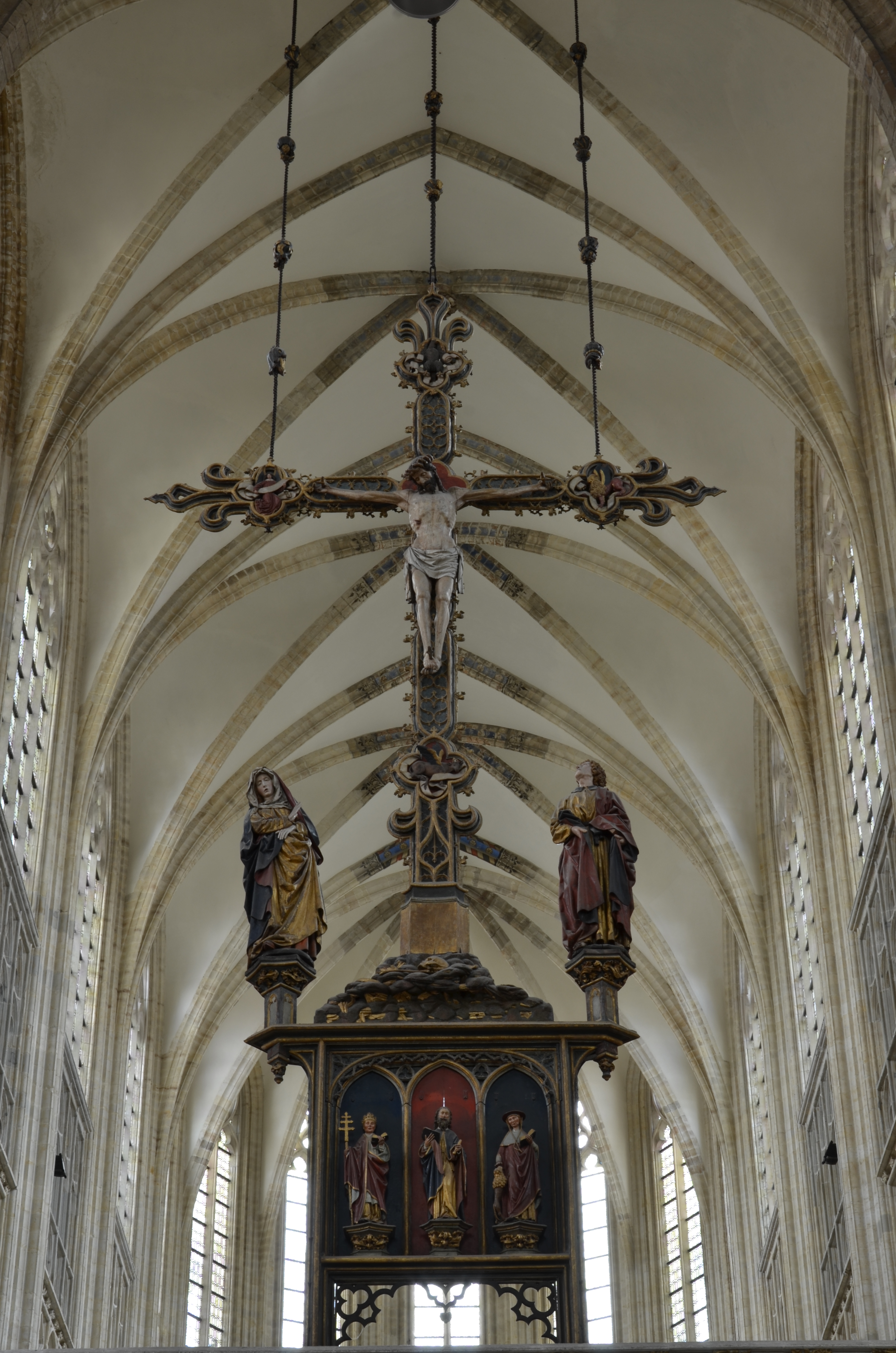 Sint-Pieterskerk middenbeuk kruis